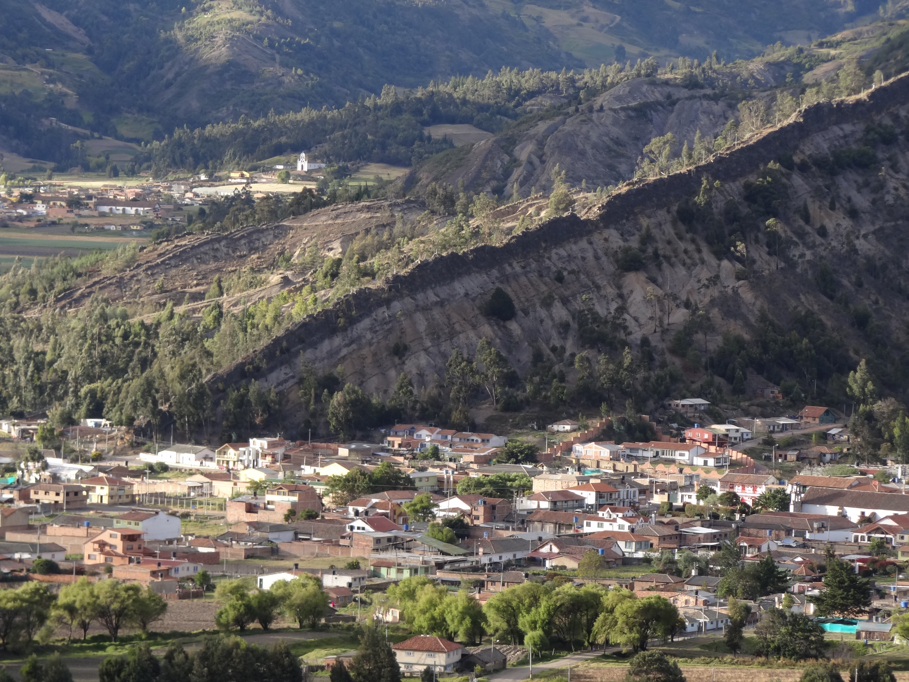 Detalle del área urbana del municipio de Cucaita, departamento de Boyacá, Colombia, al fondo, el área urbana del municipio de Sora